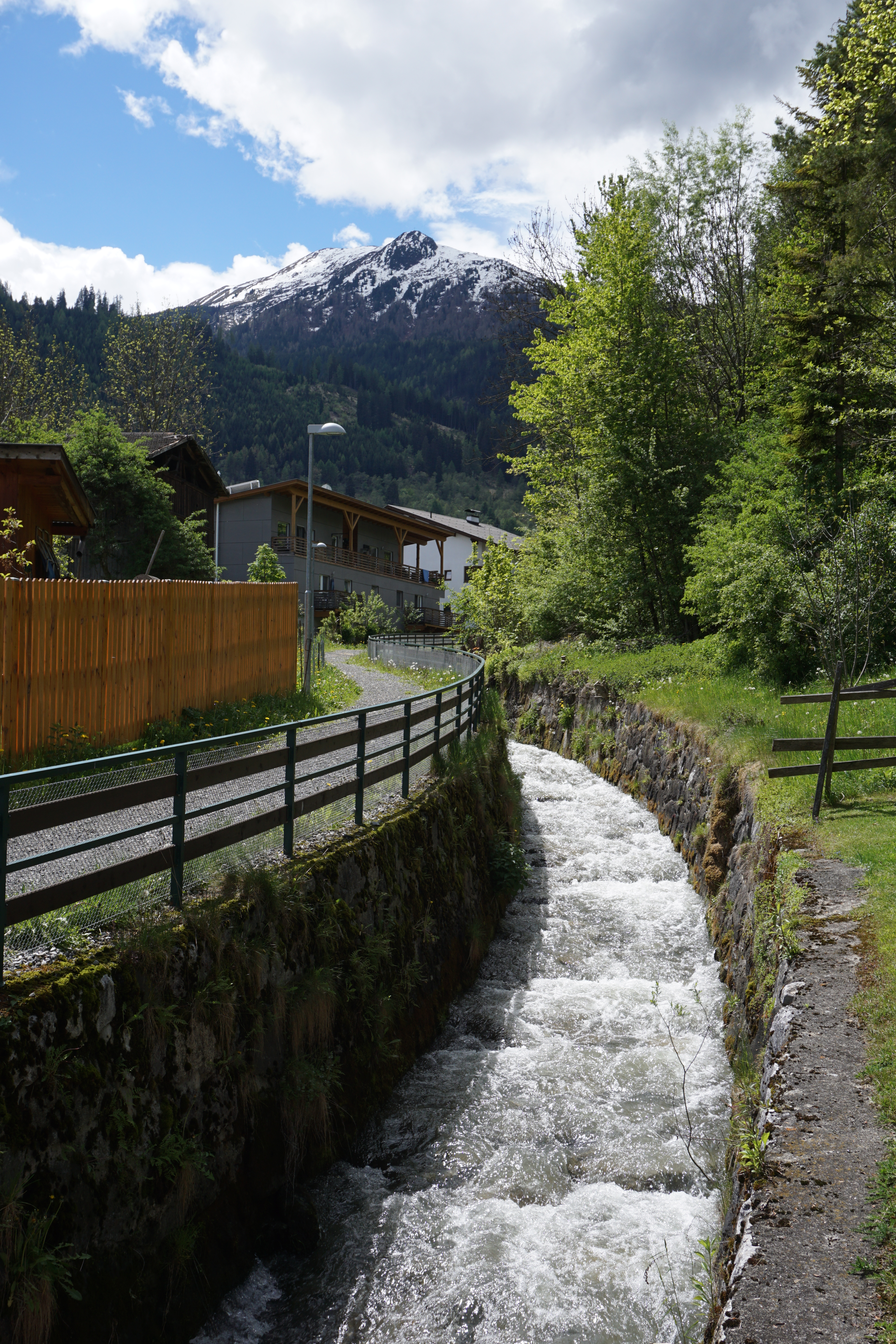 Axamer Bach und der sogenannte, rechtsufrige Katastrophenweg in Dornach